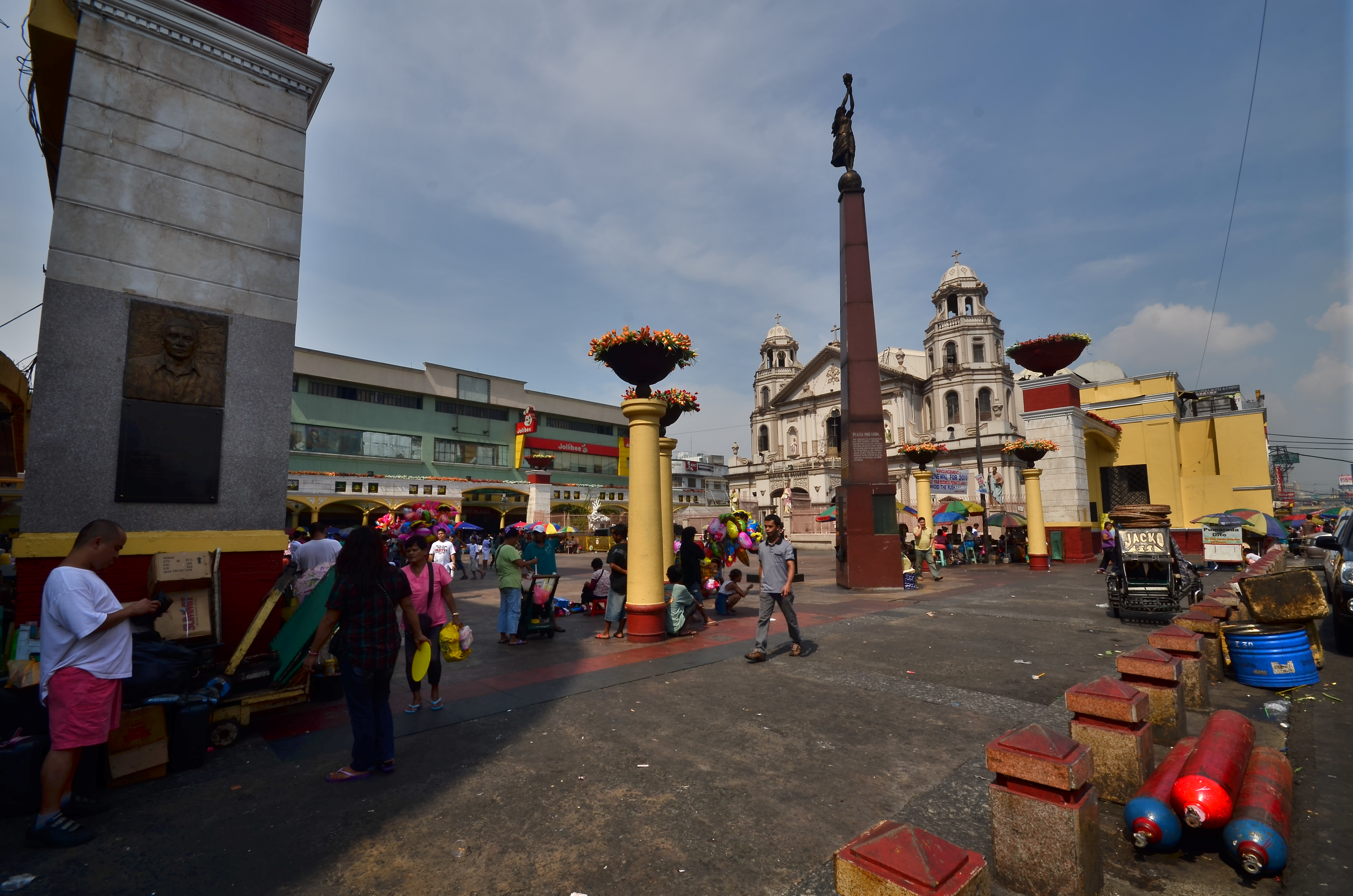 Plaza Miranda in Manila, Philippines